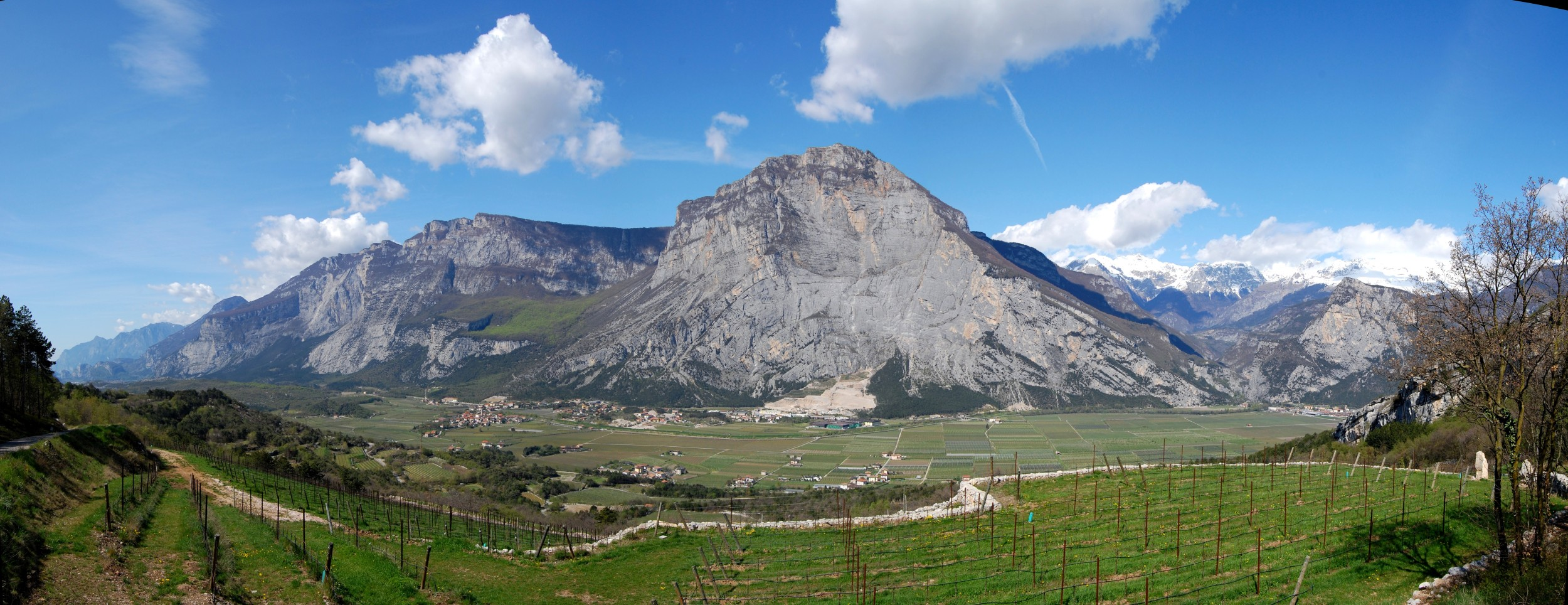 La valle del Basso Sarca da Sarche di Calavino fino al Lago di Garda.